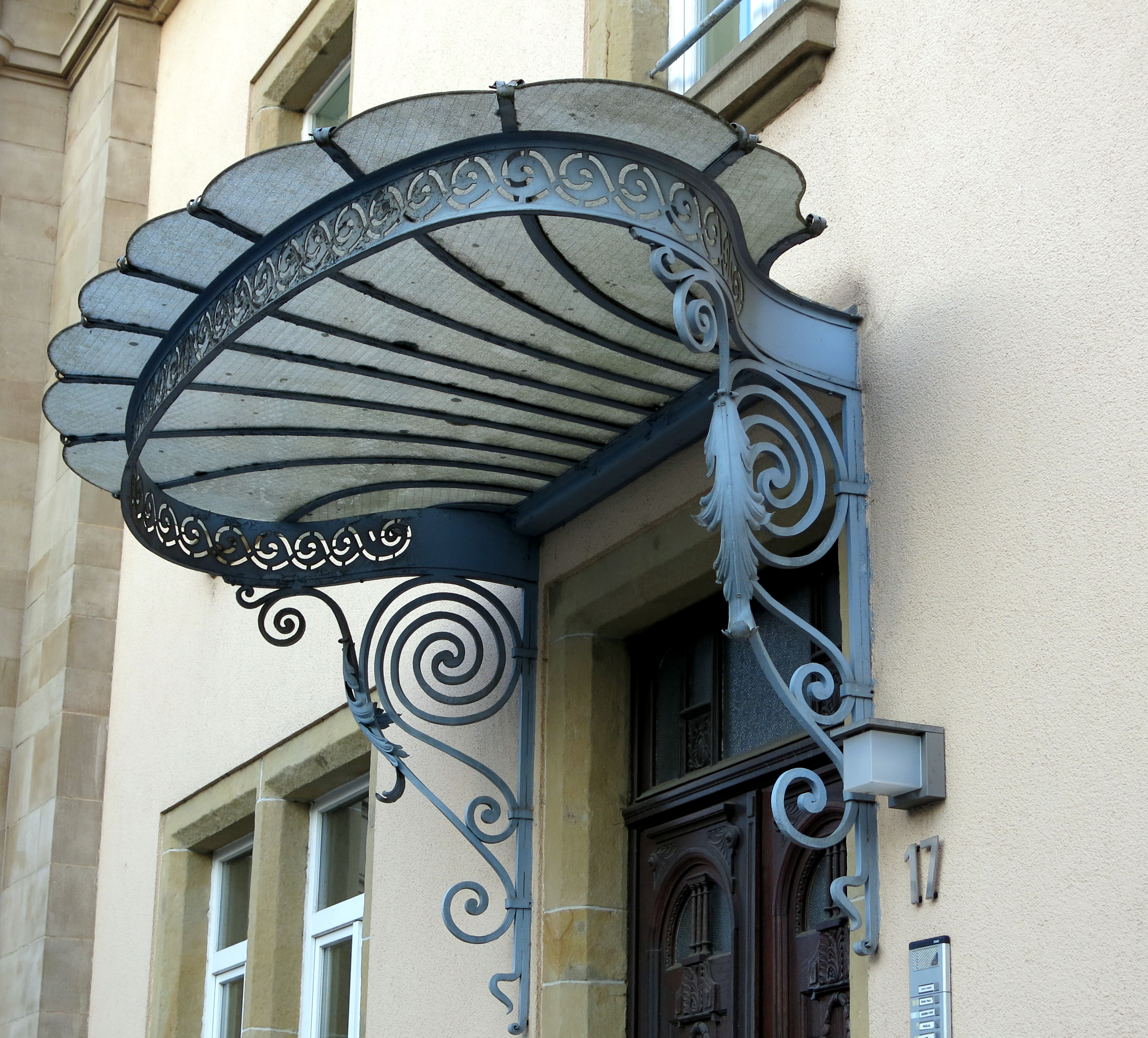 17, rue Nicolas Welter zu Miersch.